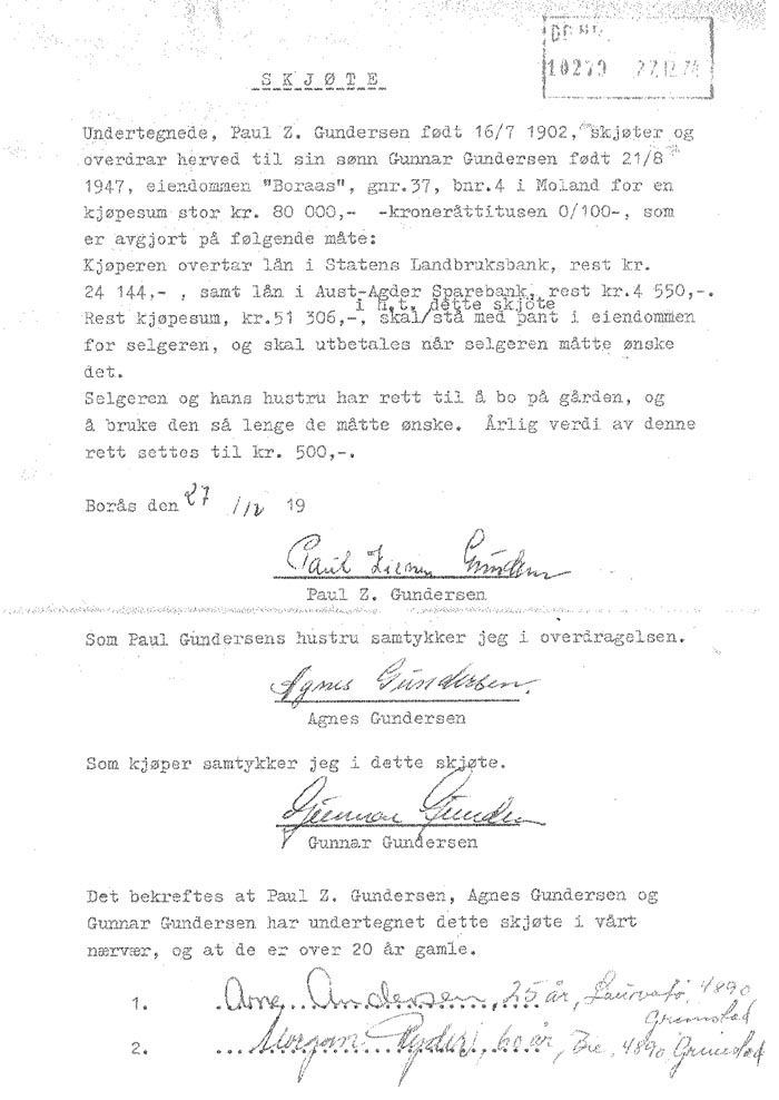 Eldre skjøte, side 1